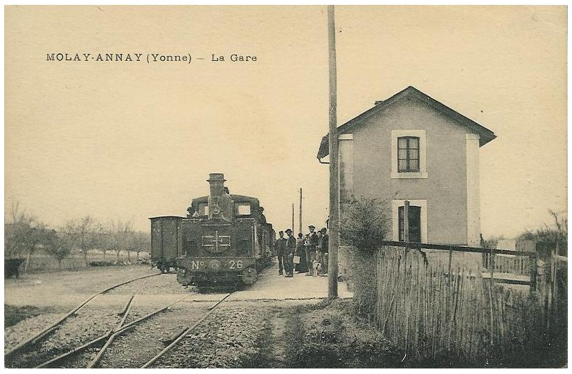 Gare d'Annay-sur-Serein sur la ligne de Laroche-Migennes à L'Isle-Angely